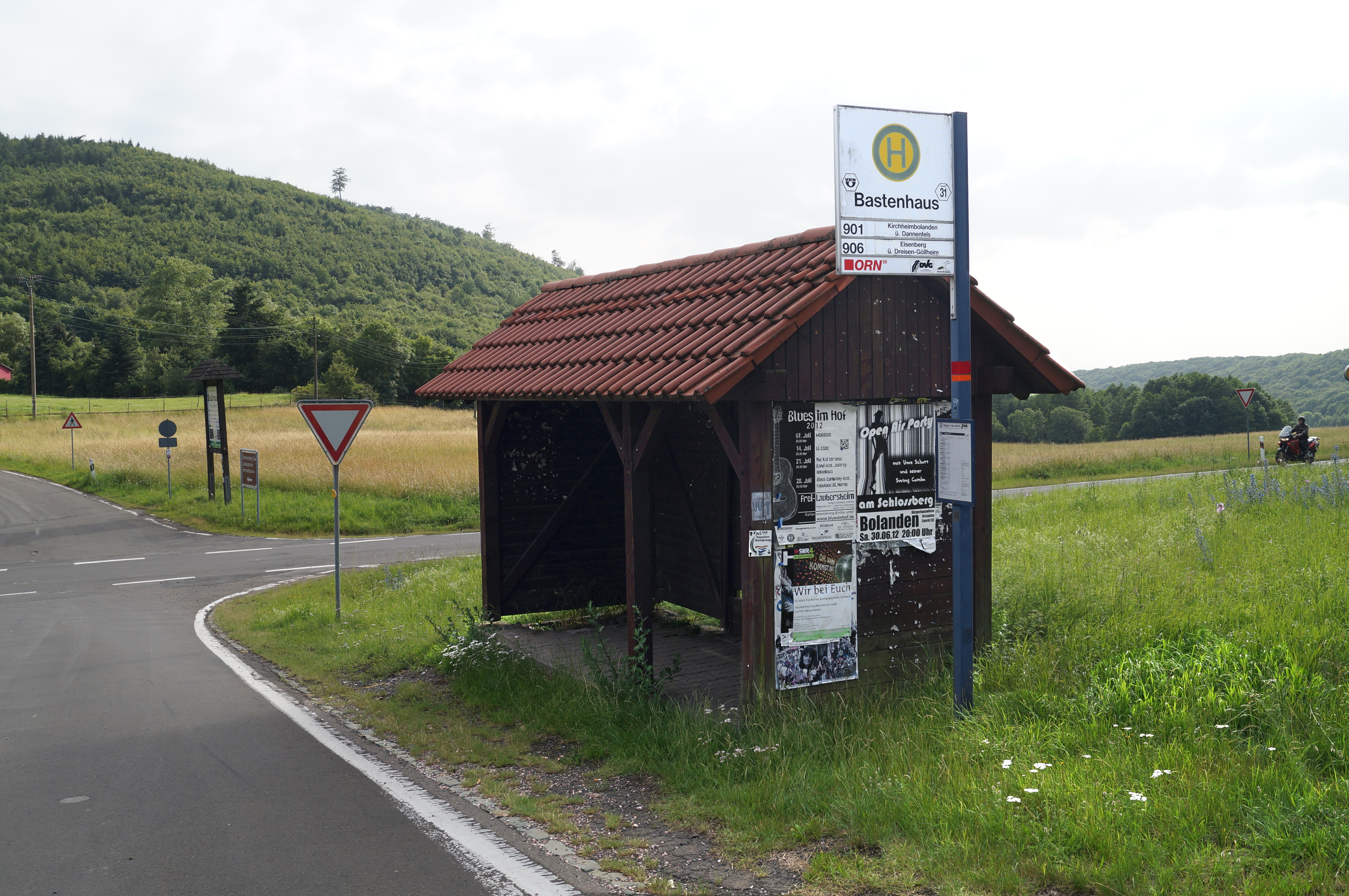 Bushaltestelle des Weilers Bastenhaus auf der Gemarkung Dannenfels